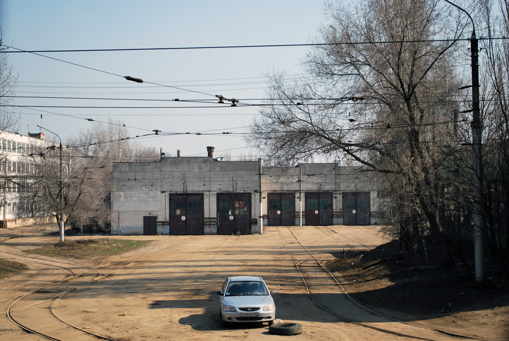 Главные ангары депо №3